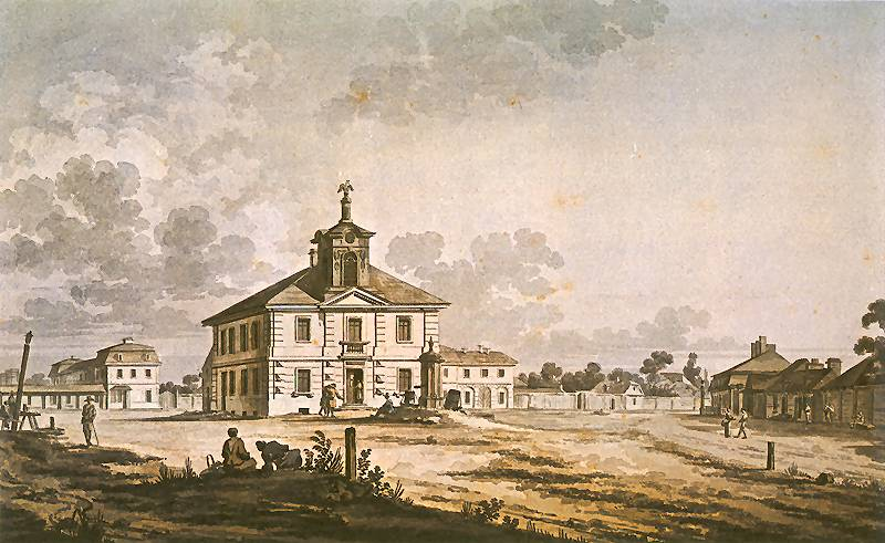 Widok ratusza Grzybowa.